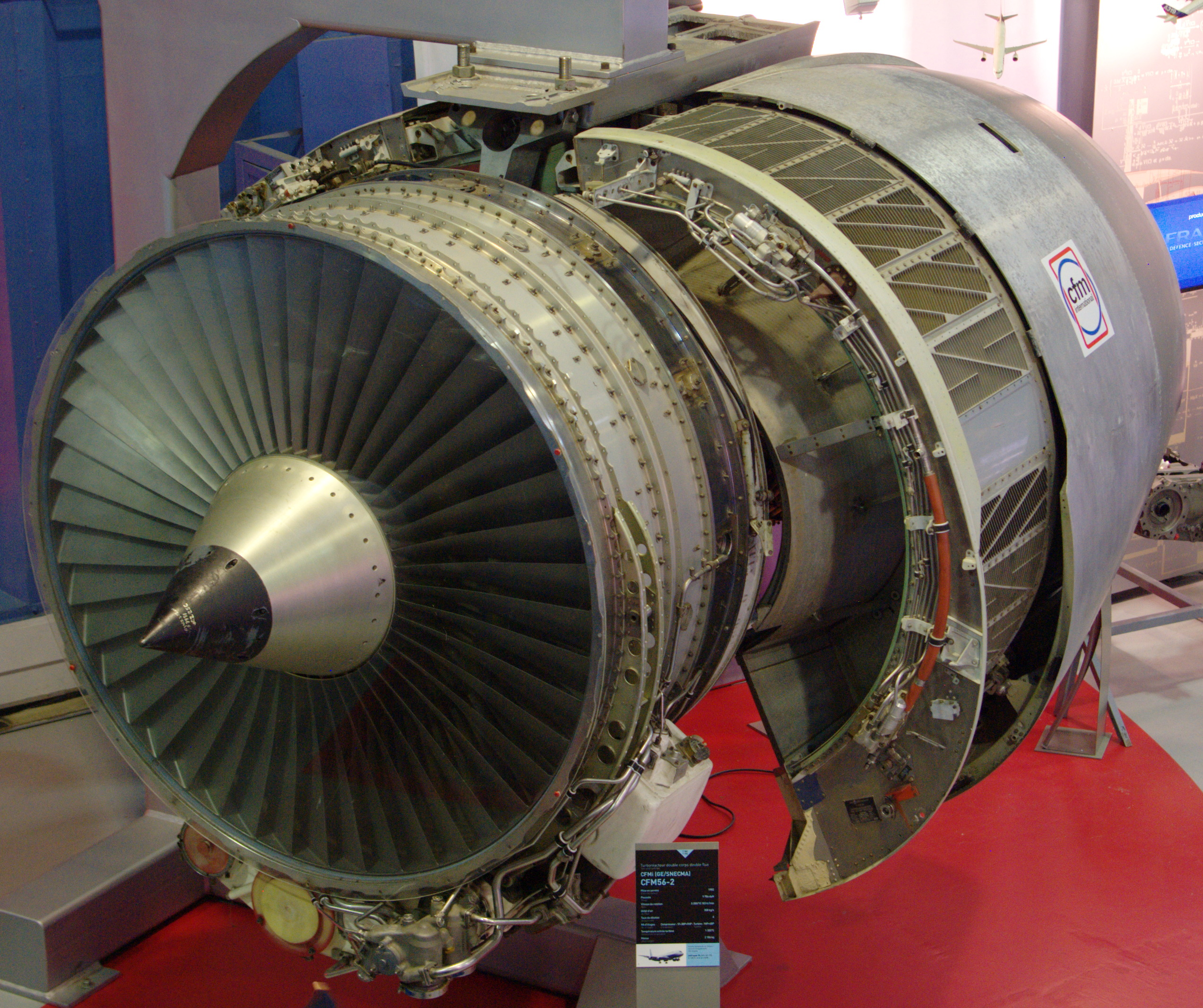 Turbofan CFM56-2 exposé au musée Safran.